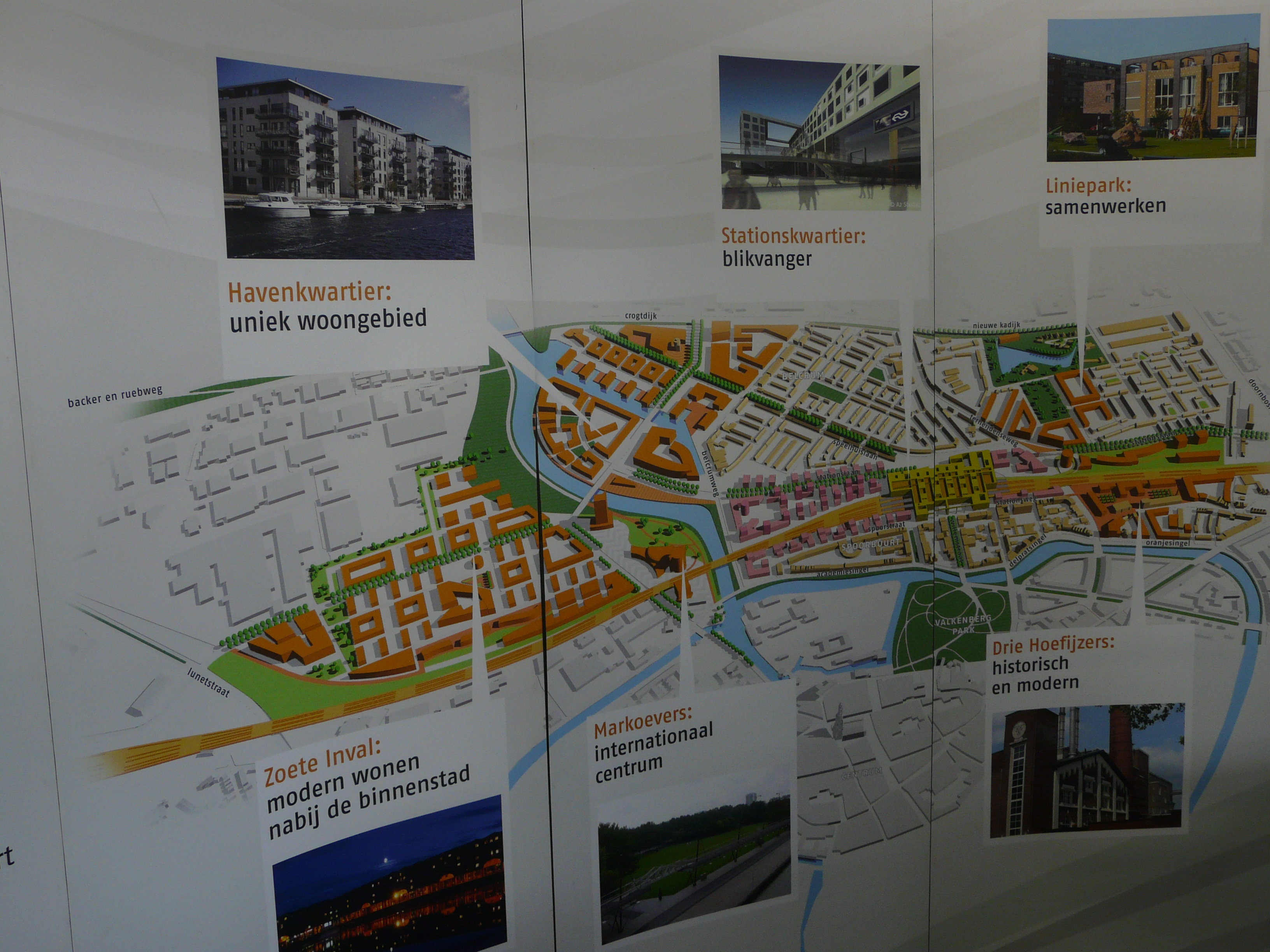 Informatiebord van het plan Via Breda voor het nieuwe Station Breda en omgeving